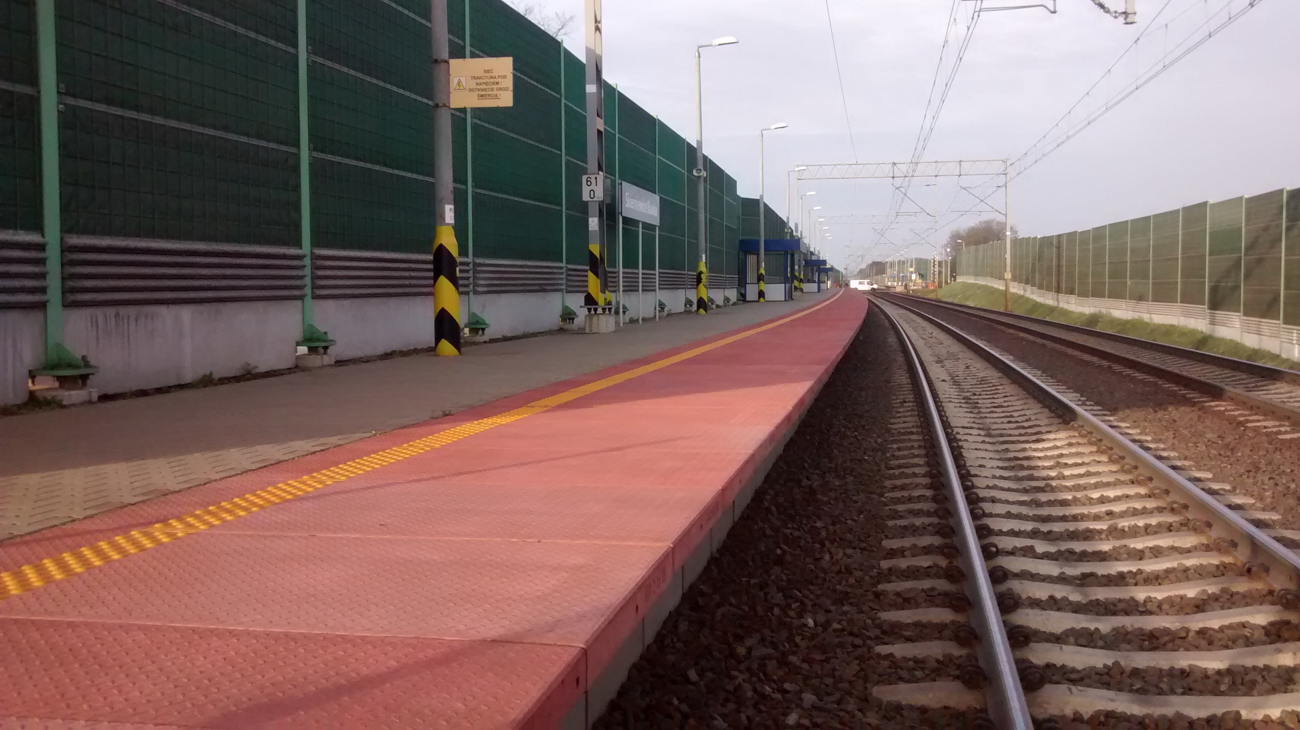 Peron I Skierniewice Rawka